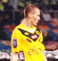 Jon Jönsson